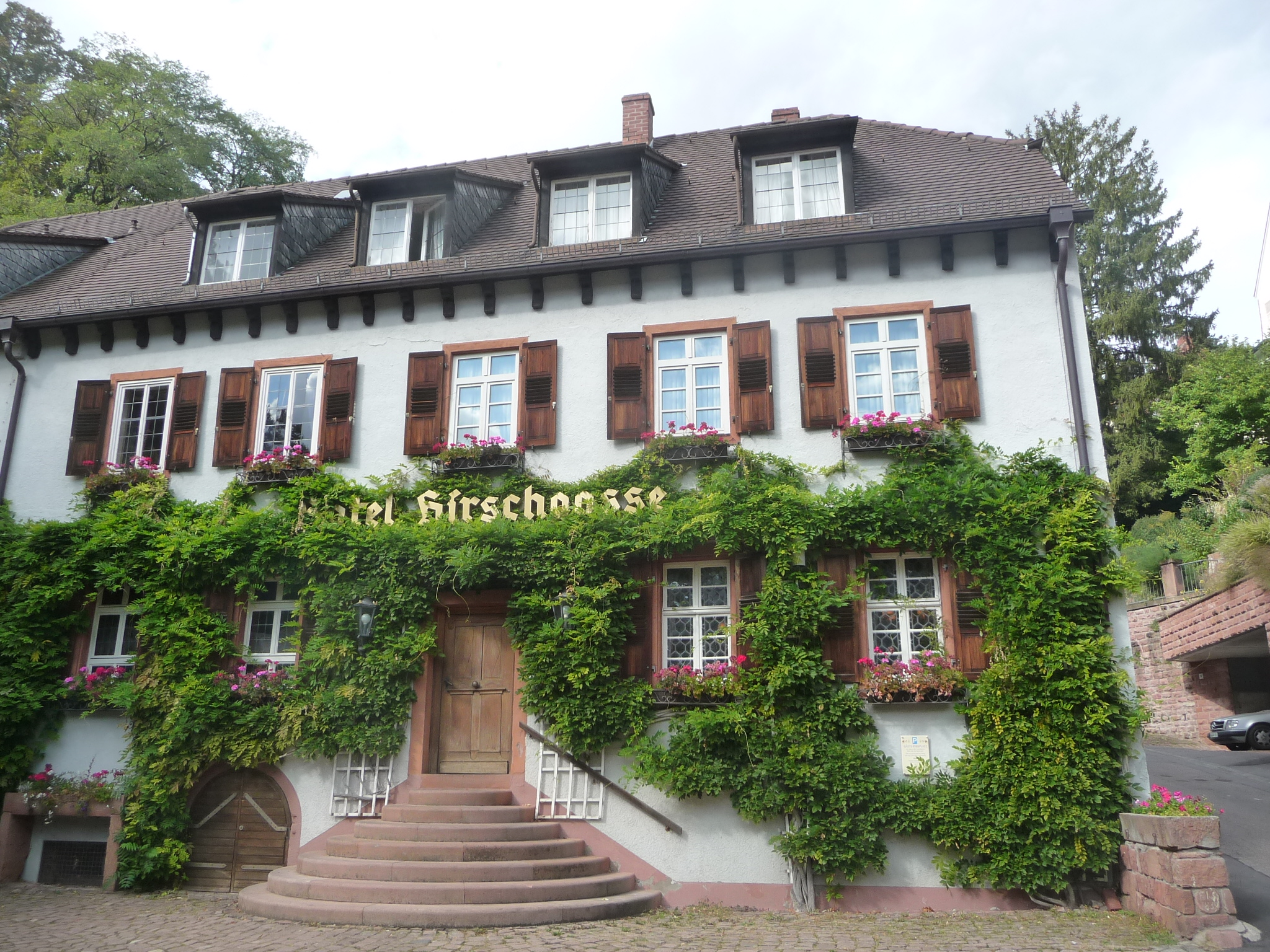 Hirschgasse in Heidelberg, Ort des berühmten Spargelessens 1935